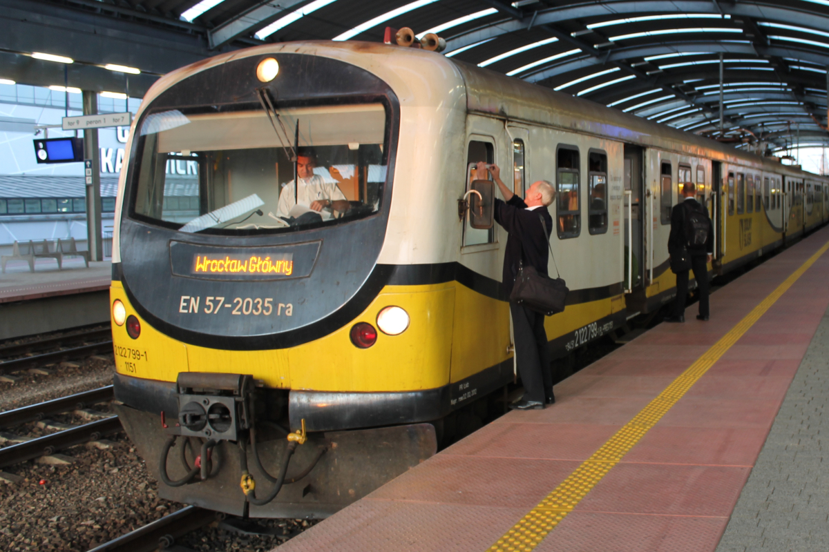 Elektryczny zespół trakcyjny EN57-2035 stoi na stacji Katowice. This photo was taken during Railway Wikiexpedition 2014 set up by Wikimedia Polska Association in cooperation with Fundacja Grupy PKP.You can see all photographs in category Wikiekspedycja kolejowa 2014.